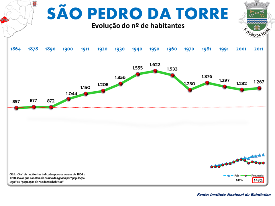 Censos 1864/2011